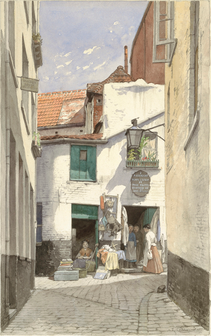 Aquarel van Jacques Carabain uit reeks over Brussel: Sint-Rochusgang